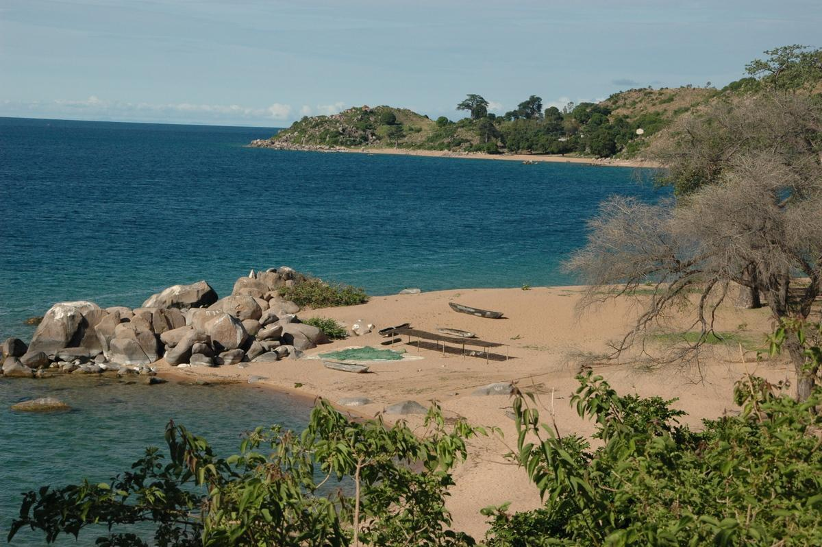 Likoma Island, Lake Malawi